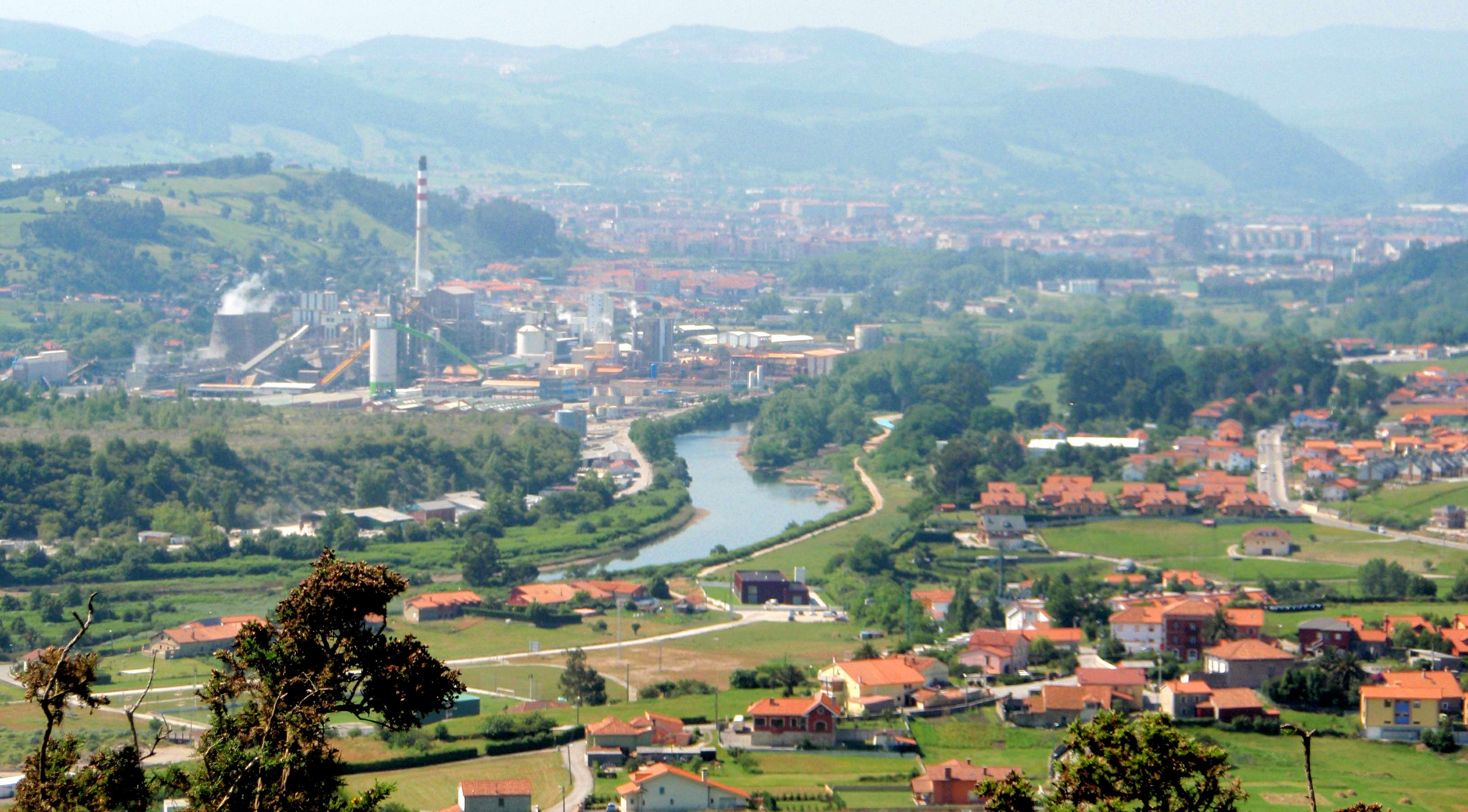 Vista panorámica de la empresa Solvay en Torrelavega (Cantabria), desde el monte La Masera.